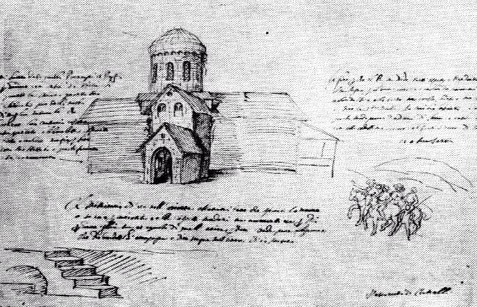 ილორის ტაძარი (დონ კრისტოფორო დე კასტელი – სამეგრელოს ნახატები » 450 ილორის ტაძარი კასტელი)